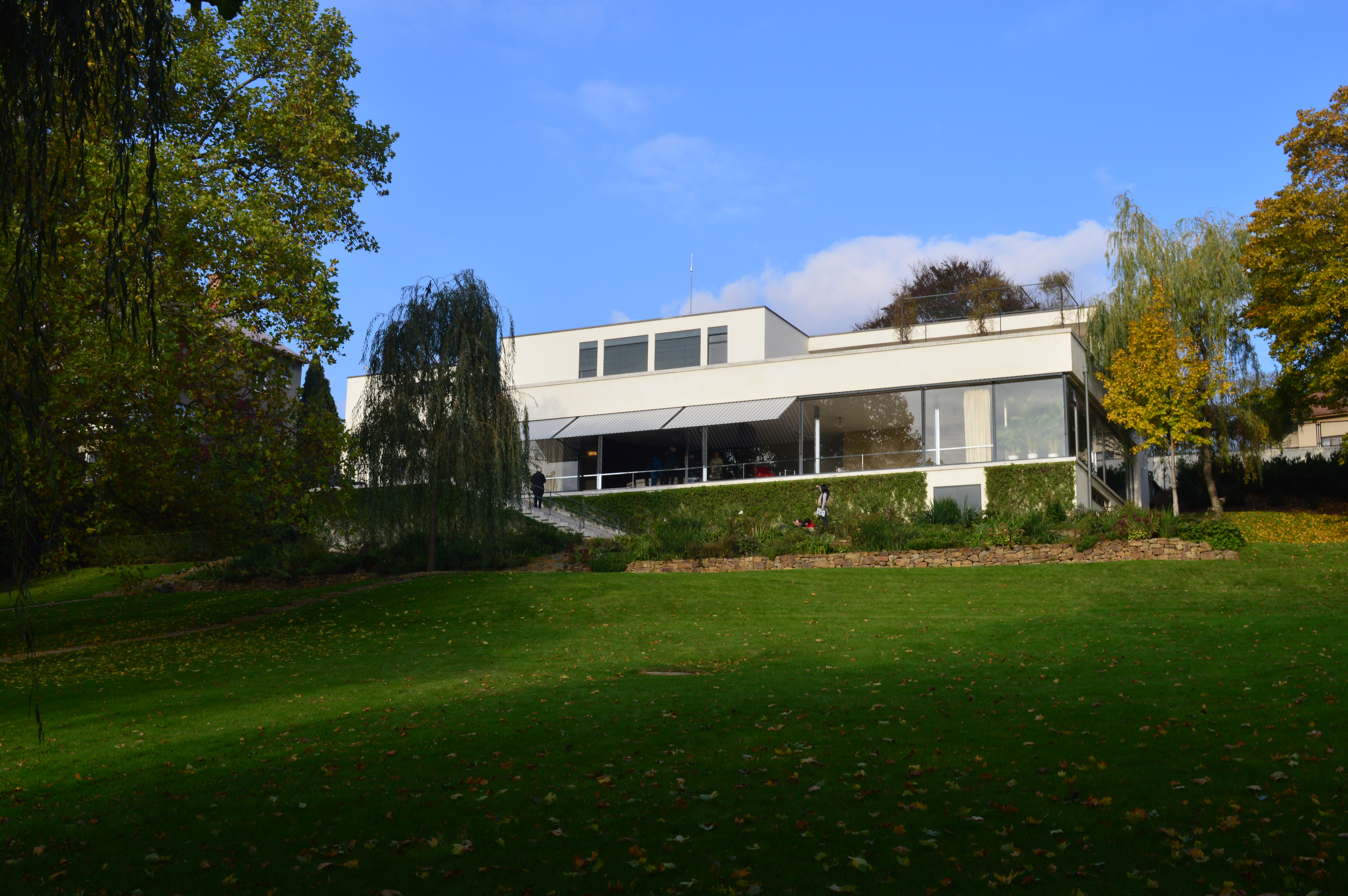 exterior Villa Tugendhat